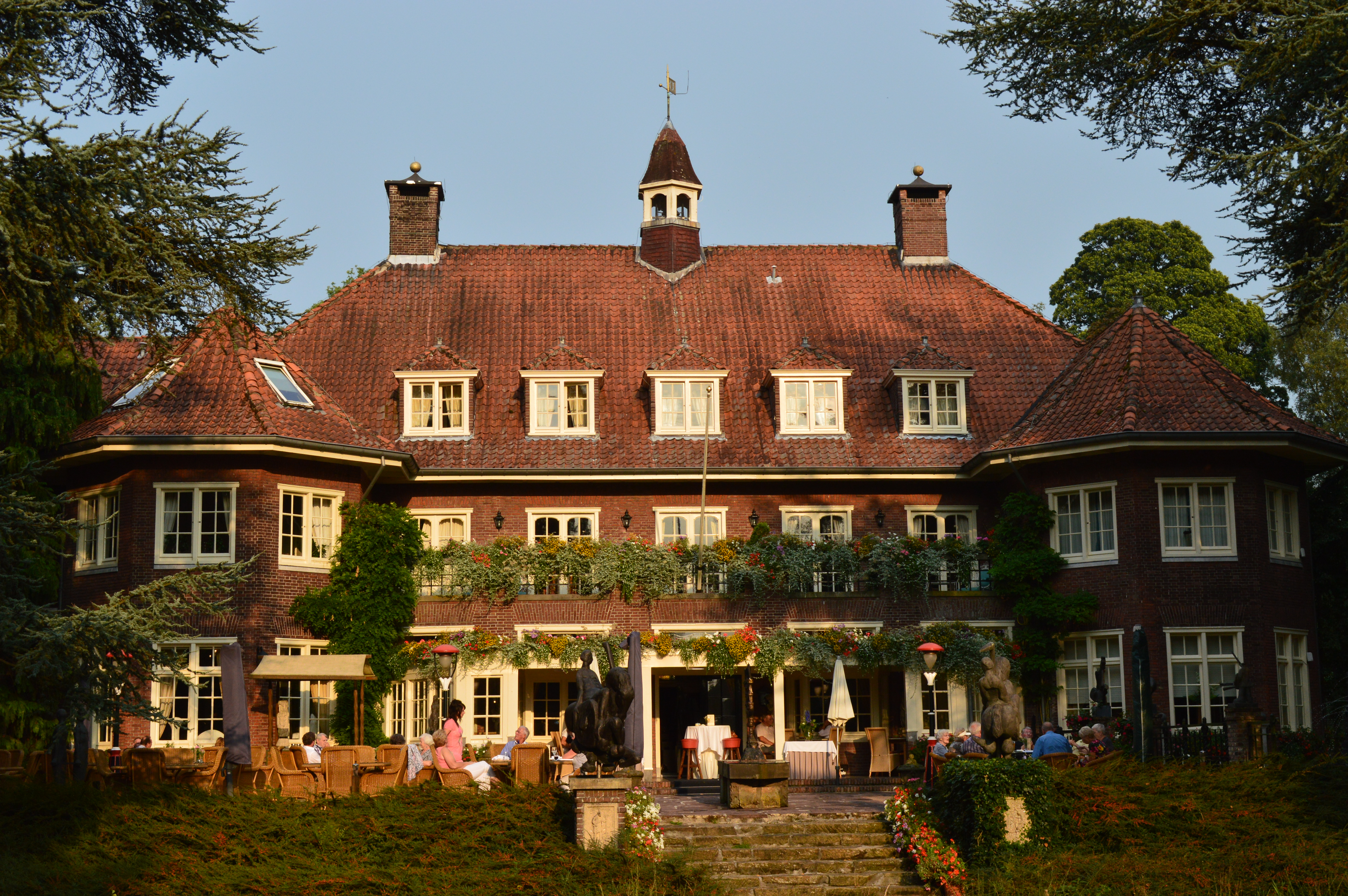 Huize Rustoord gelegen op Landgoed de Utrecht nabij Esbeek